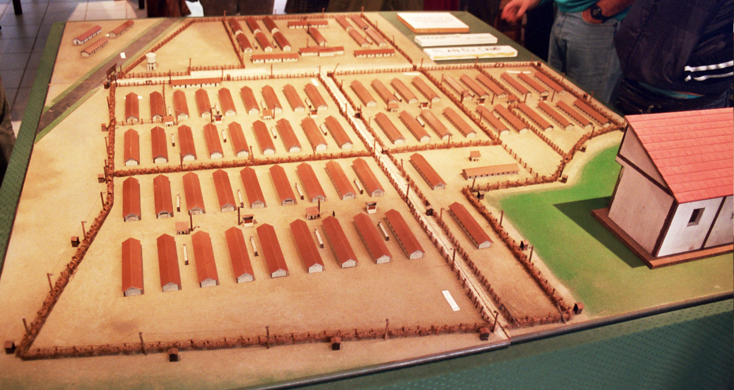 camp internament Vernet d'Ariège